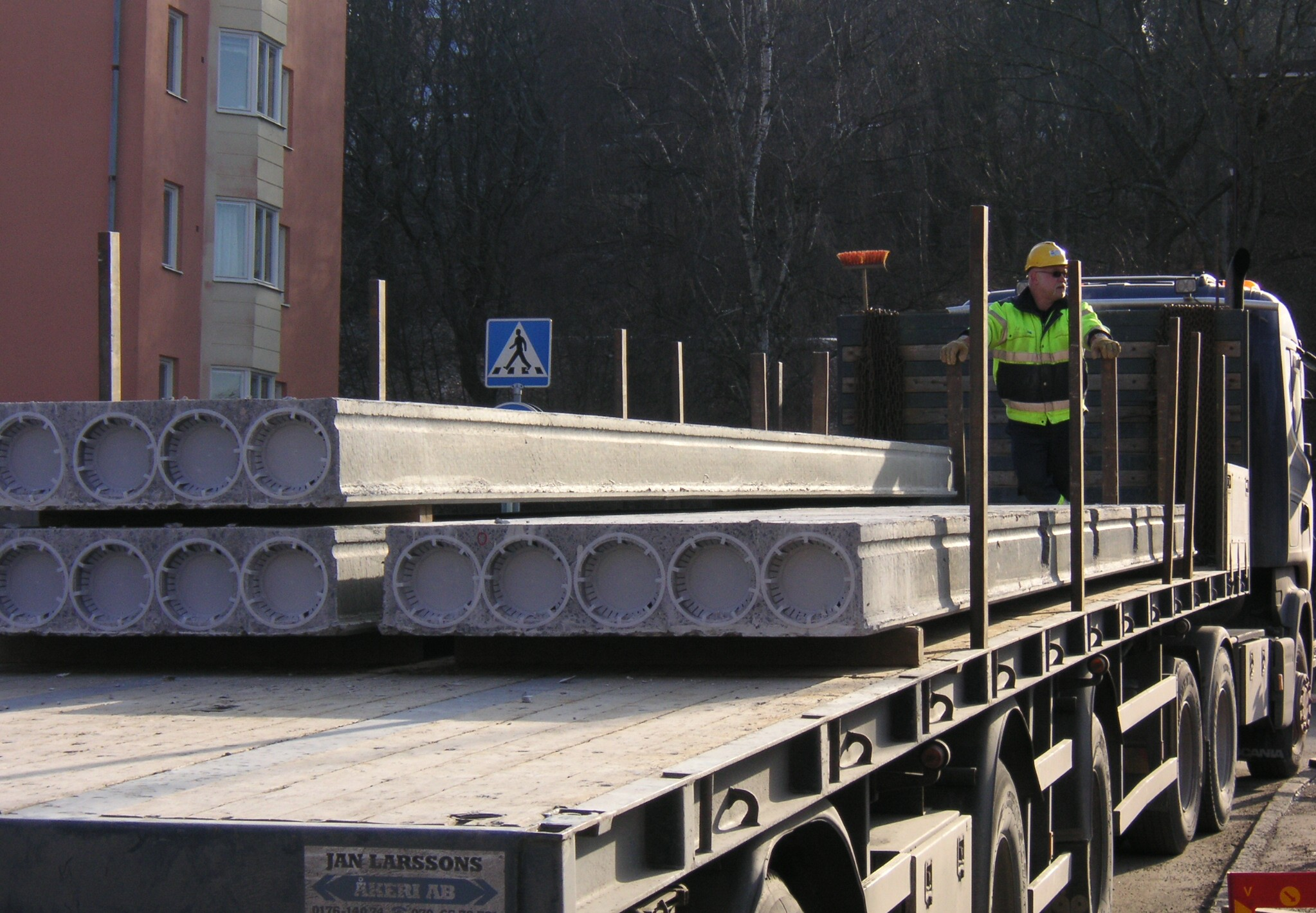 Ett betongelement av typ "Håldäck" (HD-element)